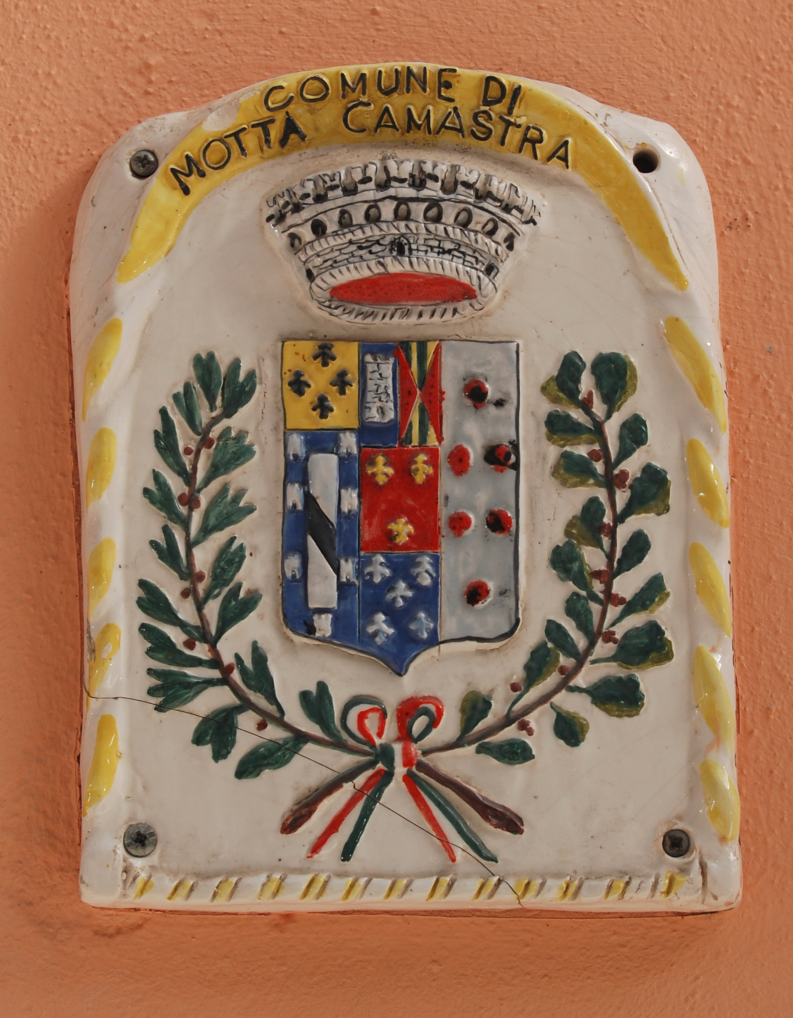 Stemma del comune di Motta Camastra, provincia di Messina, Sicilia.